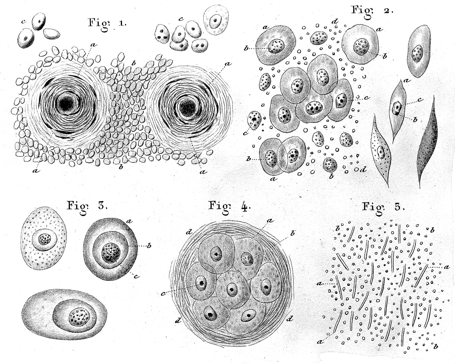 Rare Books Keywords: Hermann Lebert